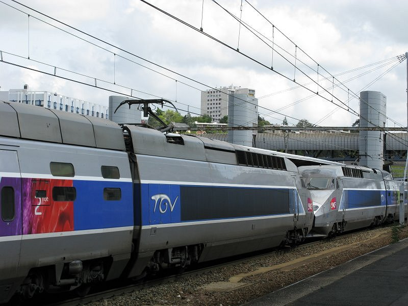 Composition de rames TGV "Atlantique" en gare de Poitiers